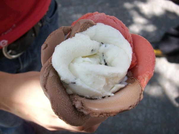 Une glace Amorino